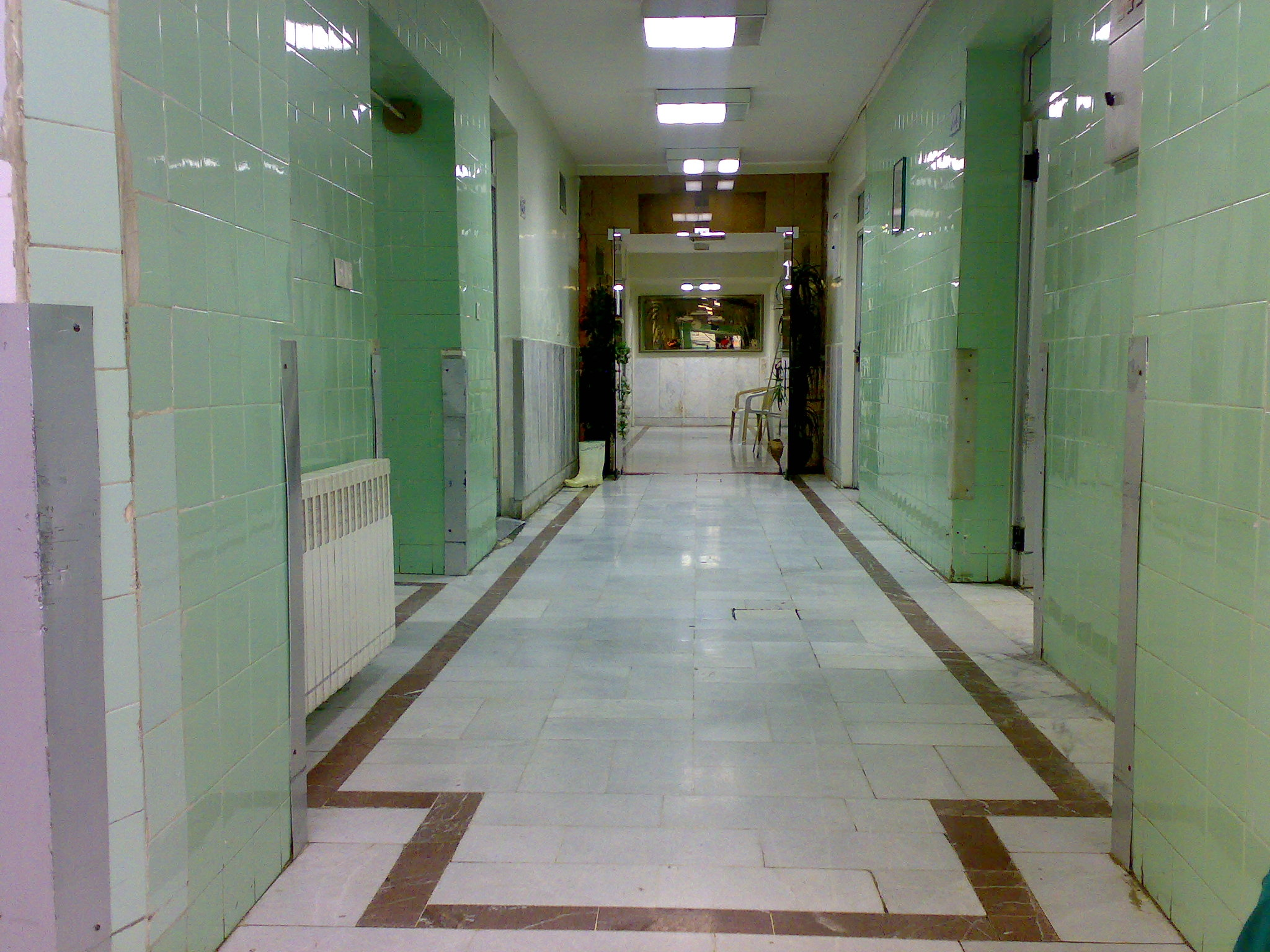 راهروی اتاق عمل پائین مسیح سال 1384